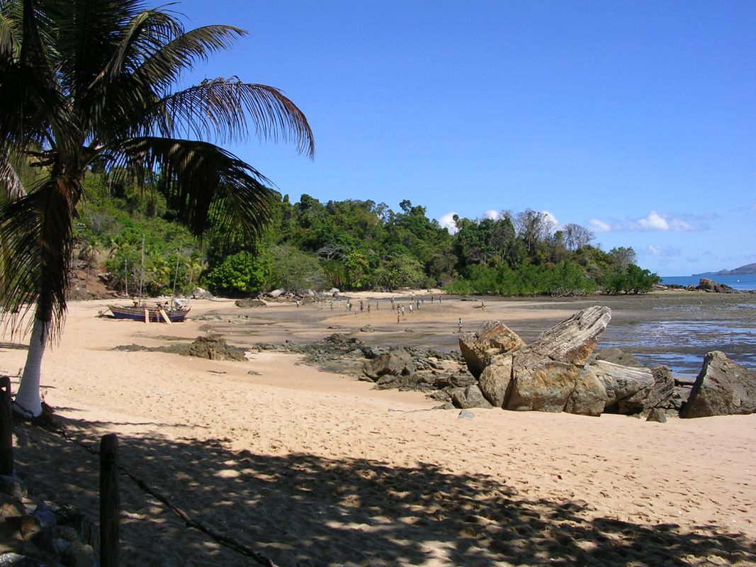 Platja a Nosy Komba (Madagascar)